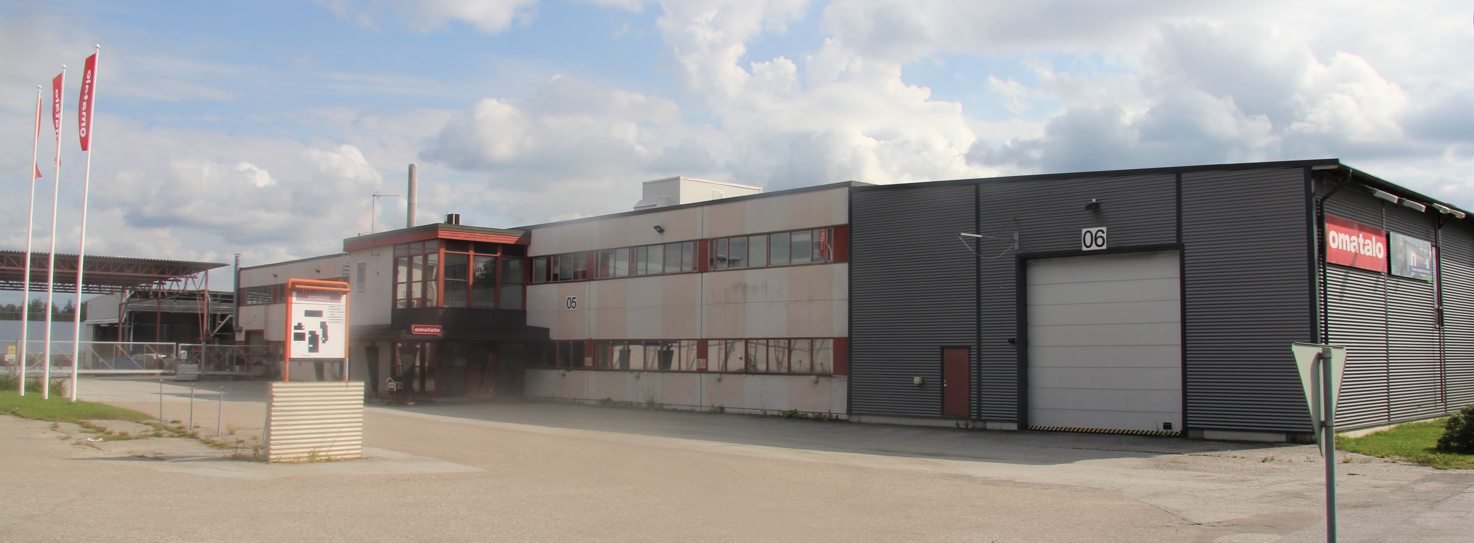 Omatalo Oy on sonkajärveläinen talovalmistaja. yrirys on eräs Sonkajärven suurimmista työnantajista.